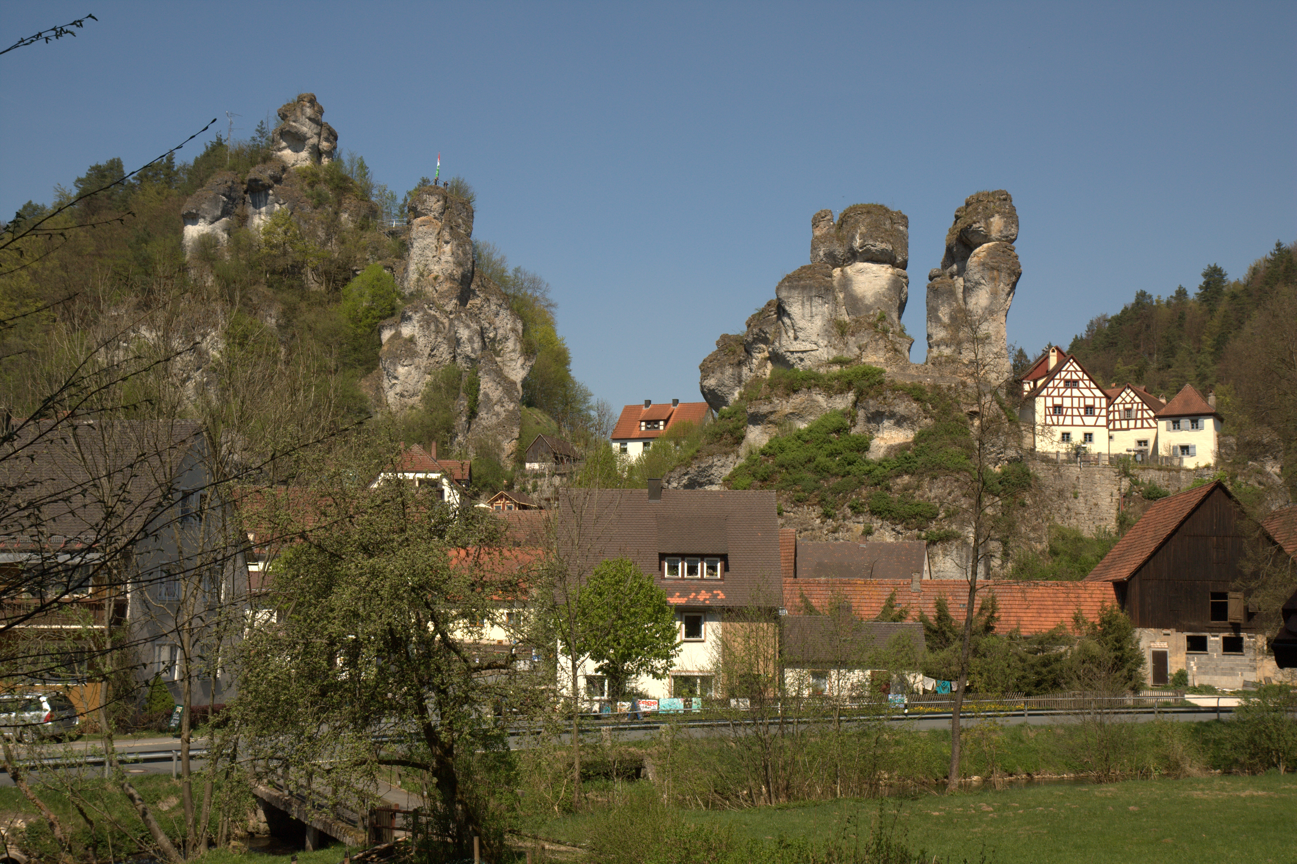 Burgstall Oberntüchersfeld - Ansicht der beiden Burgfelsen in Tüchersfeld, links Oberntüchersfeld, rechts Niederntüchersfeld